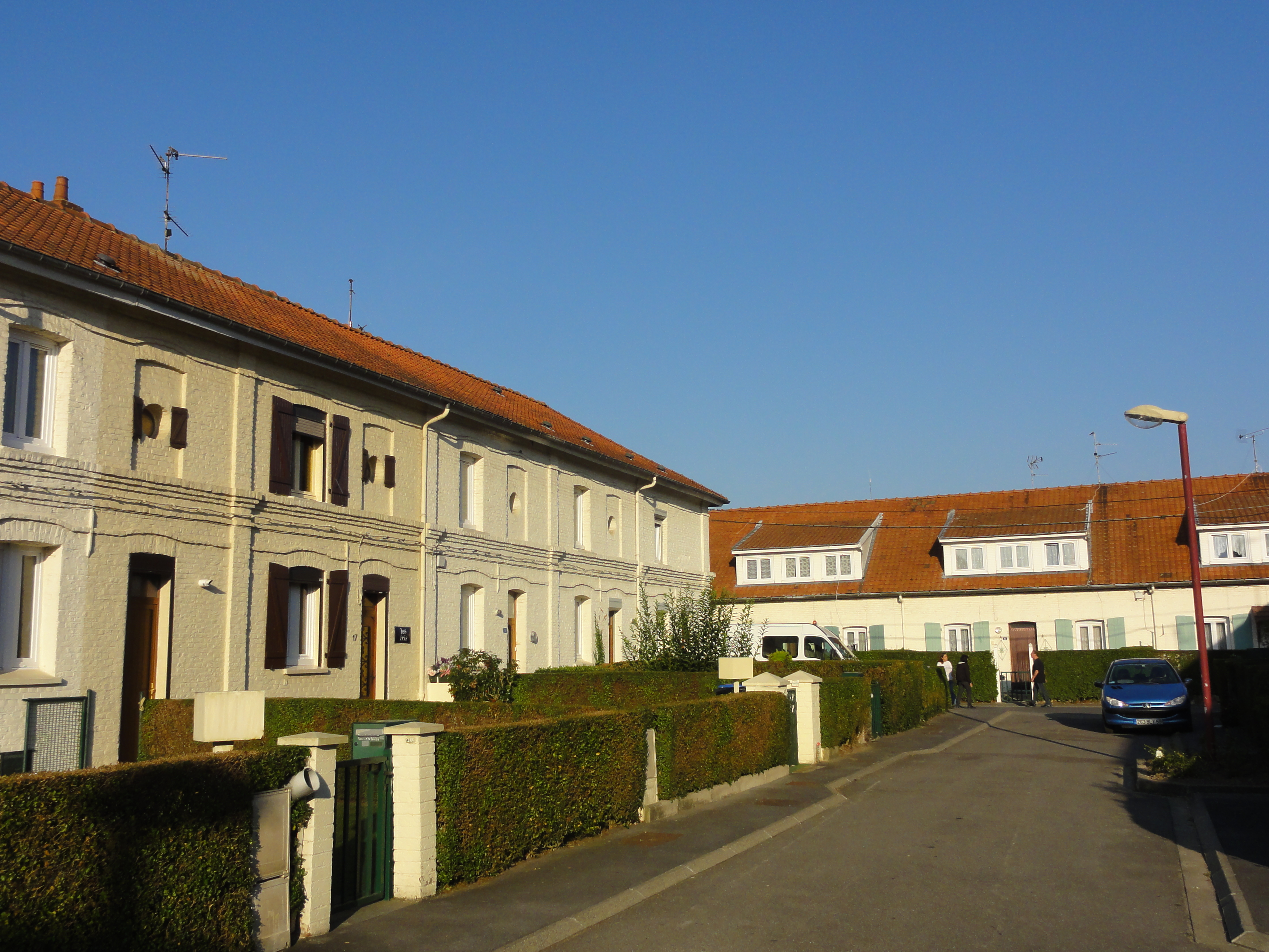 Cités de la Fosse La Sentinelle de la Compagnie des mines d'Anzin, La Sentinelle, Nord, Nord-Pas-de-Calais, France. .